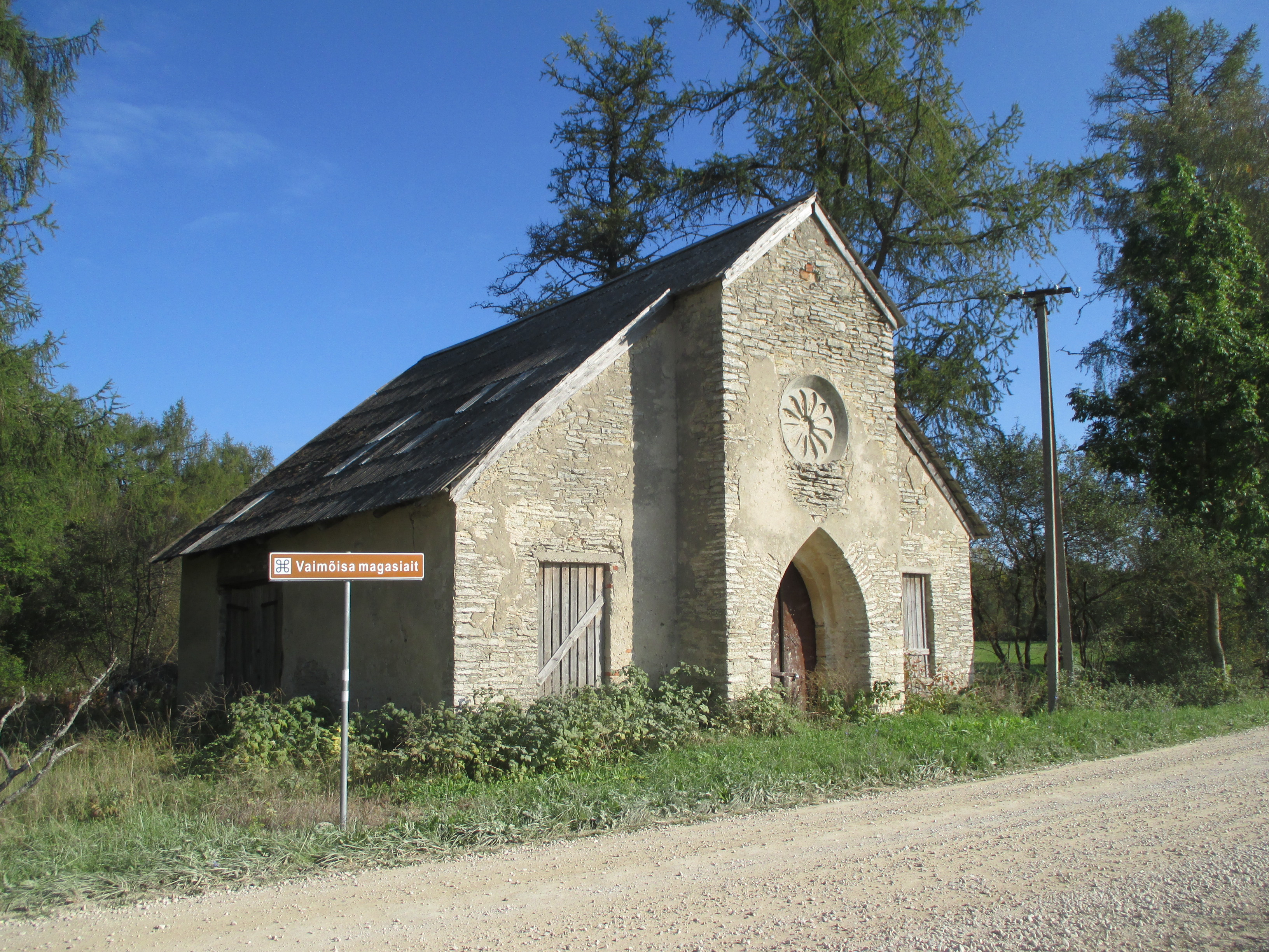 Vaimõisa magasiait, hiljem kasutatud sepikojana